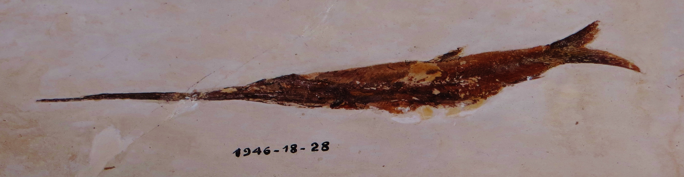 Fossil of Ichthyotringa, an extinct fish- Took the photo at Musee d'Histoire Naturelle, Paris